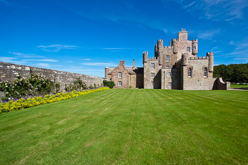 Castle of Mey, die Sommerresidenz von Queen Mum bei John o'Groats in der Grafschaft Caithness, Schottland